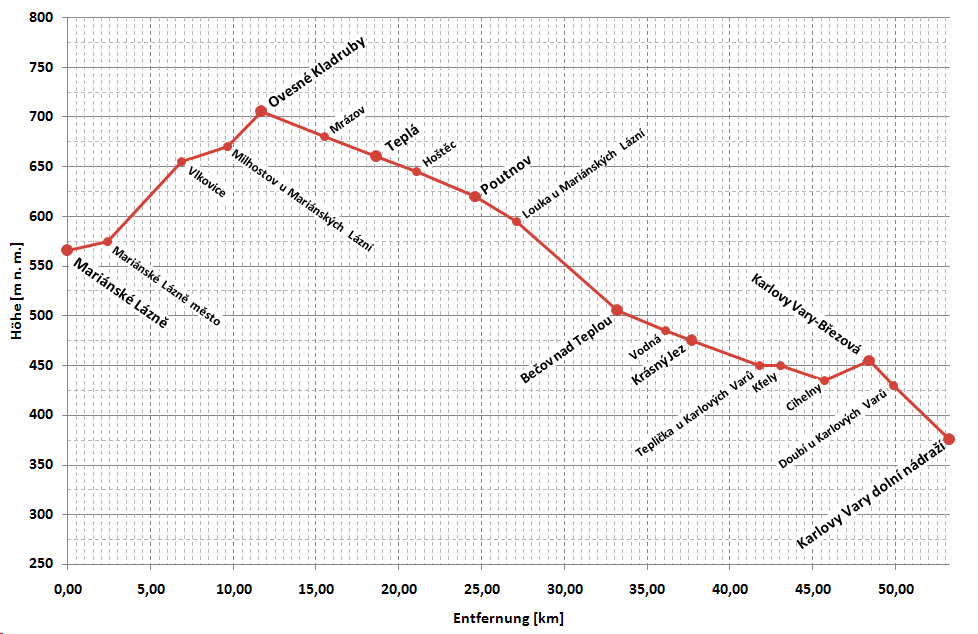 vereinfachtes Höhenprofil der Bahnstrecke Mariánské Lázně–Karlovy Vary